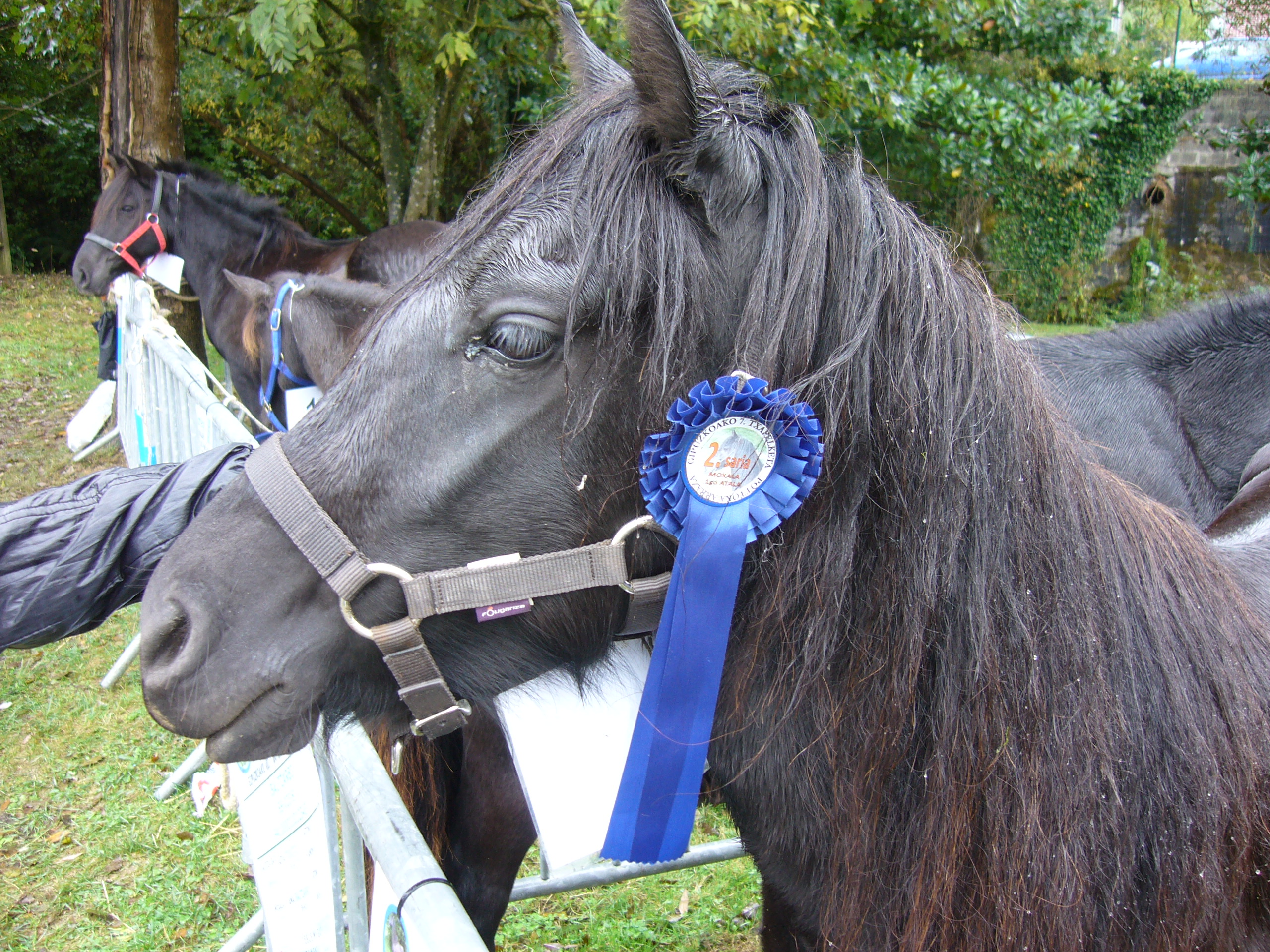 2010eko urriko Ormaiztegiko azokan zaritutako behorra